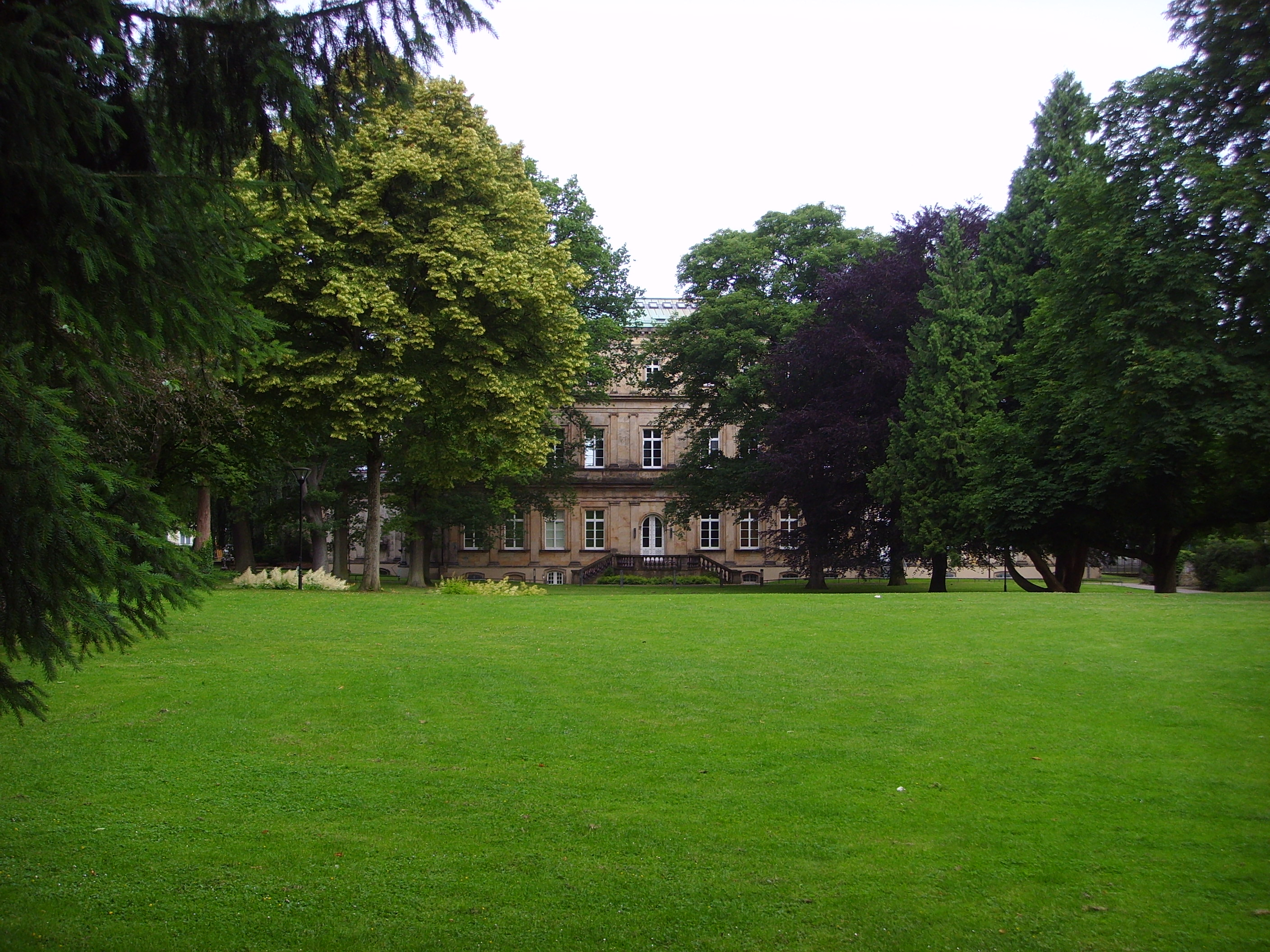 Palaisgarten Detmold mit der Hochschule für Musik Source: own work Date: June 21, 2008, Detmold, North Rhine-Westphalia, Germany Author: Maschinenjunge Licence: GFDL, cc-by 3.0